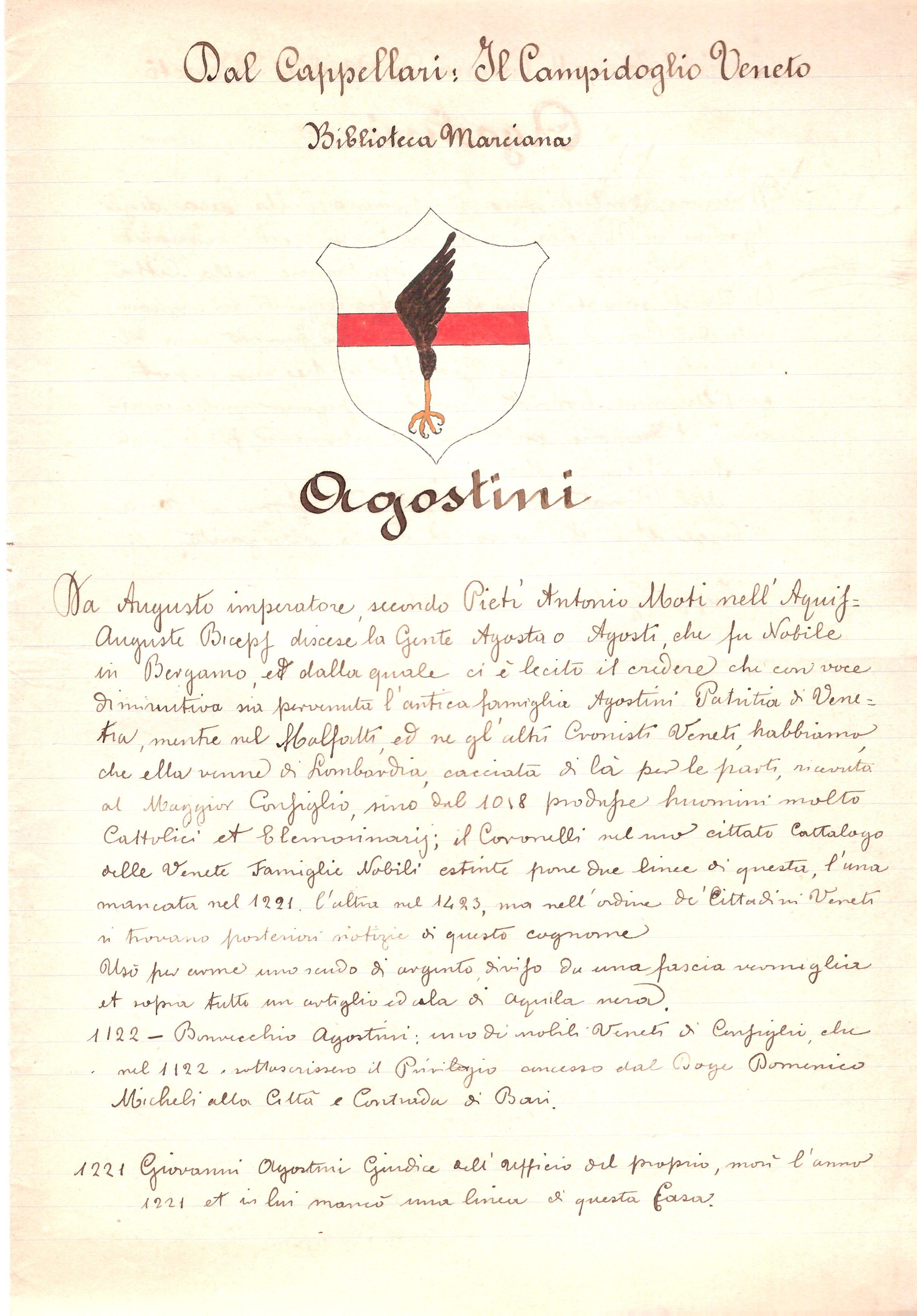 Famiglia Agostini. Biblioteca Nazionale Marciana - estratto dal Cappellari: il Campidoglio Veneto